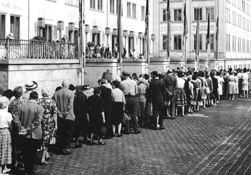 Zentralbild-Koch-Eckleben Sd-Qu 2.8.1962 Die Messestadt nahm Abschied von Prof. Konwitschny Die Einwohner Leipzigs nahmen am 2.8.1962 Abschied von dem am 28. Juli in Belgrad verstorbenen Gewandhaus-Kapellmeister und 1. Generalmusikdirektor der Deutschen Staatsoper Berlin, Nationalpreisträger Prof. Dr. h.c. Franz Konwitschny. Drei Stunden lang defilierten im Vestibül der Neuen Leipzier Oper Männer, Frauen und Jugendliche an dem Sarg mit der sterblichen Hülle des großen Künstlers vorüber. UBz. Die Leipziger Bevölkerung vor der Neuen Oper.